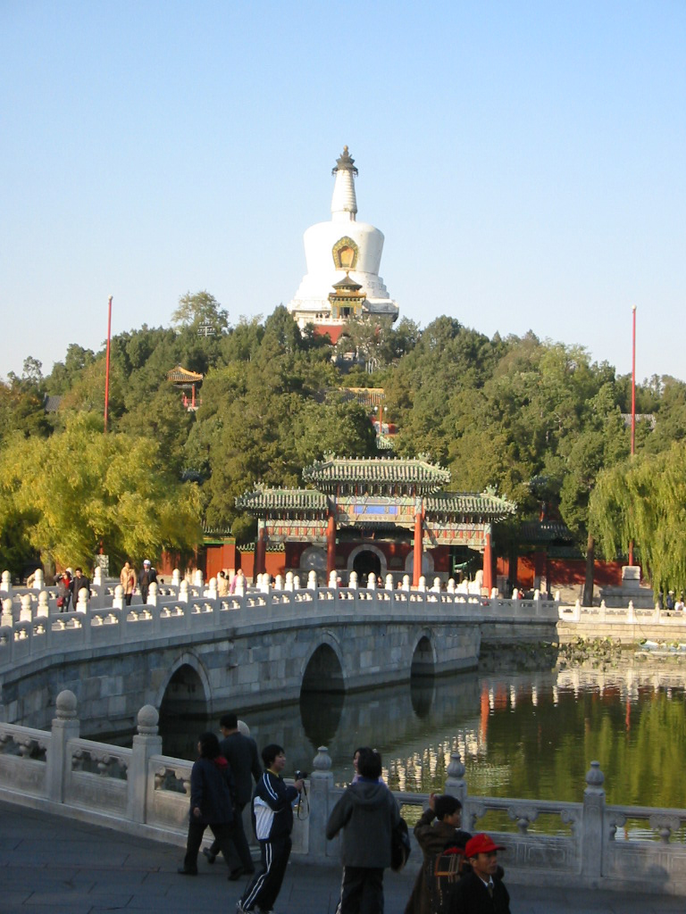 The Beihai Park in Beijing